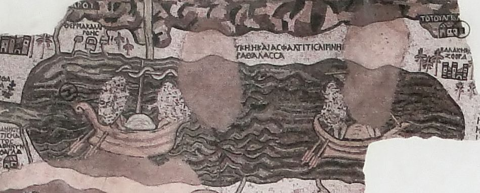 Madaba Map - Dead Sea